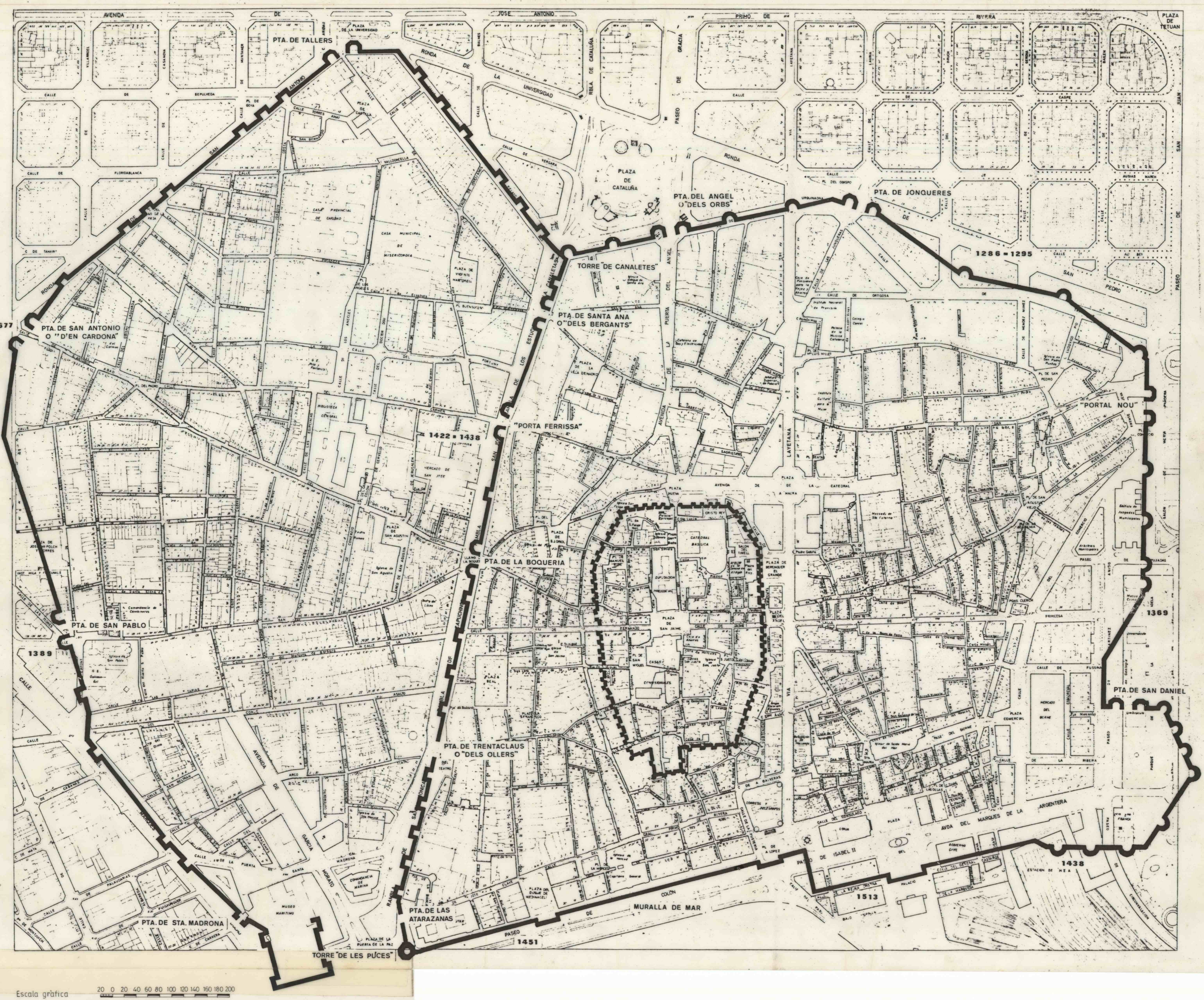 Plànol de la ciutat de Barcelona amb el traçat de l'antiga muralla medieval (Segles XIII-XIV)